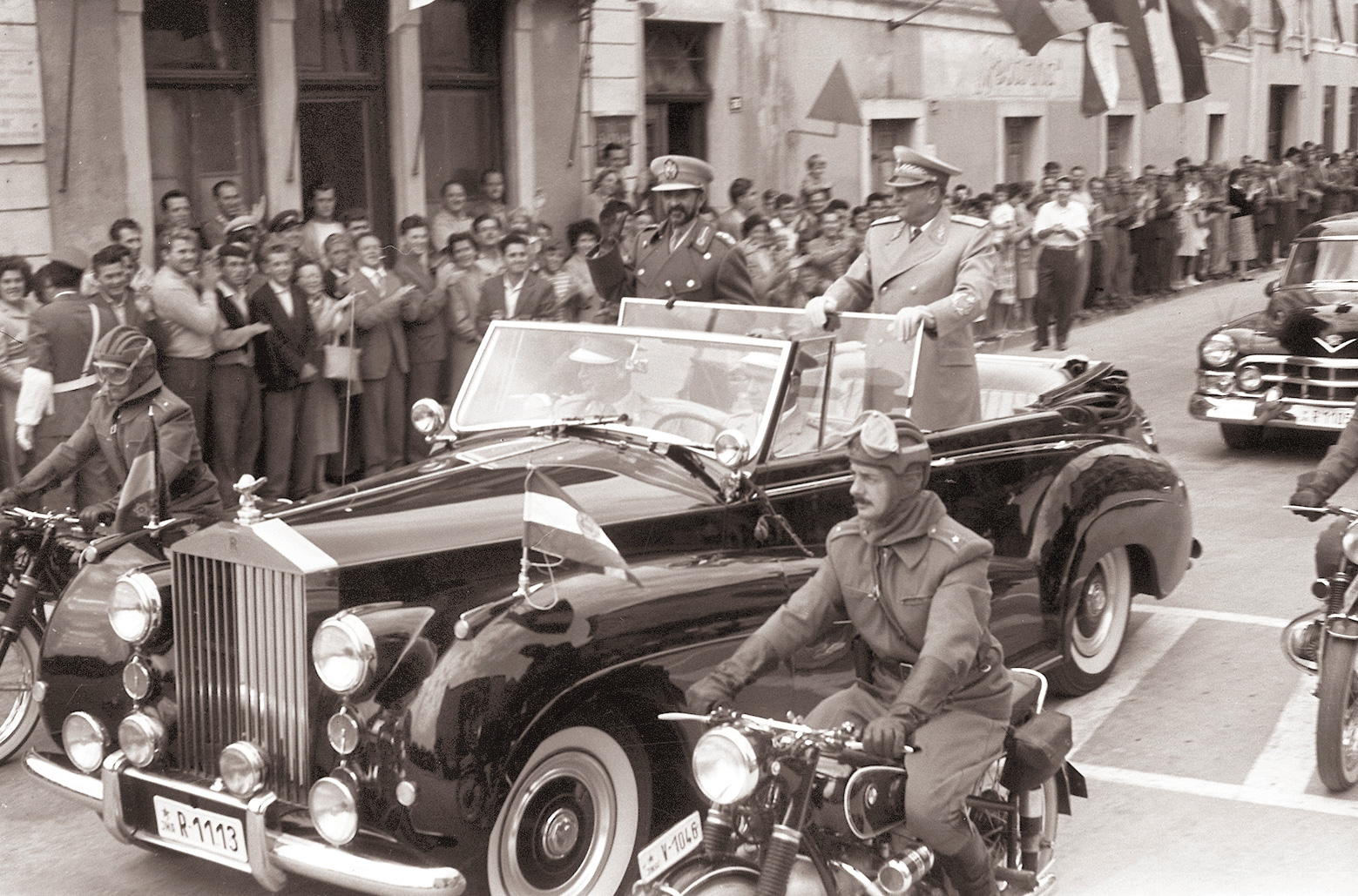 Josip Broz Tito in cesar Haile Selassie v Kopru.